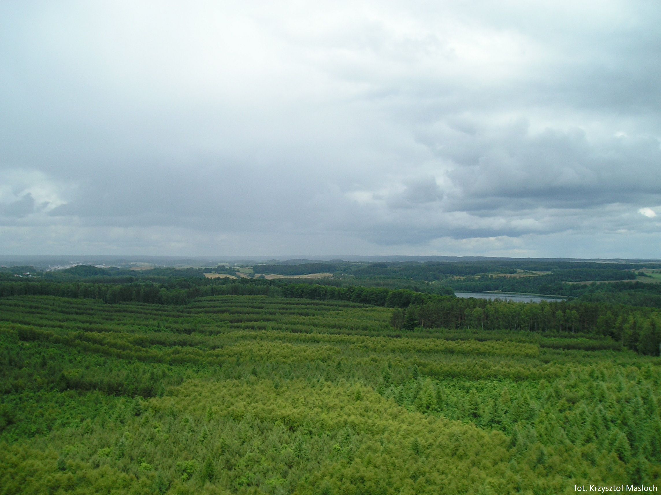 Miastko i jezioro Studzieniczno z wieży przeciwpożarowej Nadleśnictwa Miastko